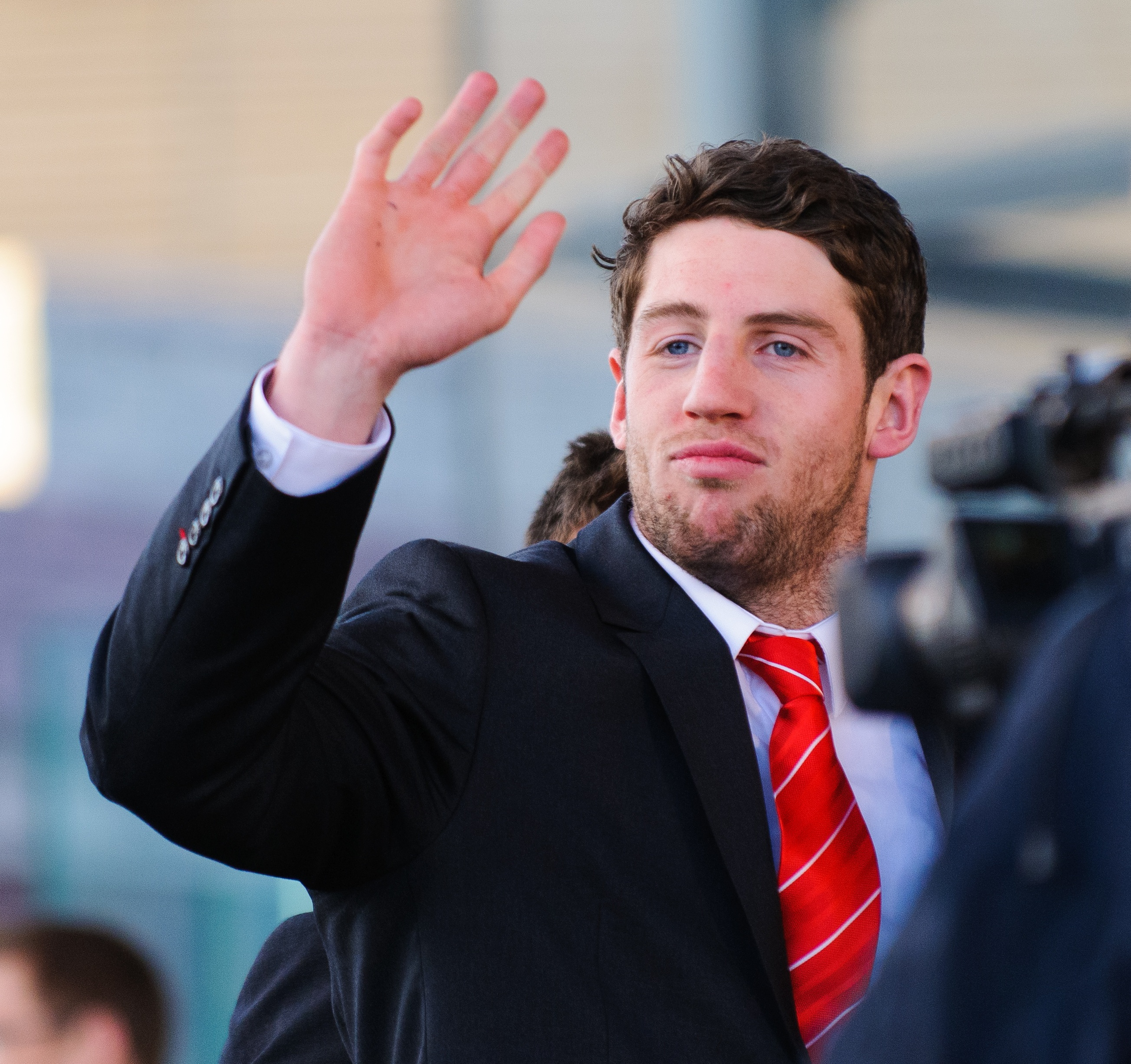 Alex Cuthbert waves to the fans! Wales Grand Slam Celebration, Senedd 19 March 2012 / Alex Cuthbert yn cyfarch y cefnogwyr, Dathliadau Camp Lawn Cymru, Senedd 19 Mawrth 2012